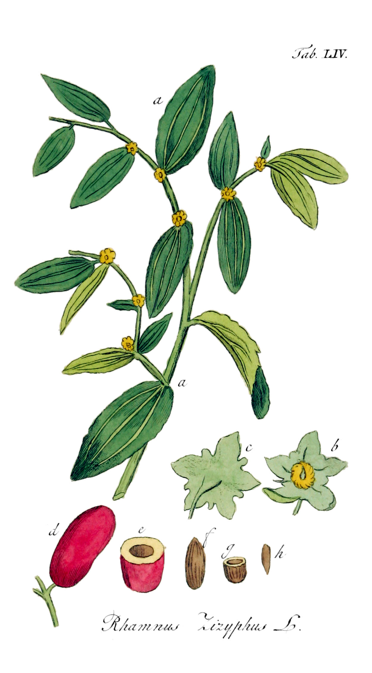 Ziziphus jujuba, Tab. 54 from Adolphus Ypey, Vervolg ob de Avbeeldingen der artseny-gewassen met derzelver Nederduitsche en Latynsche beschryvingen, Eersde Deel, 1813